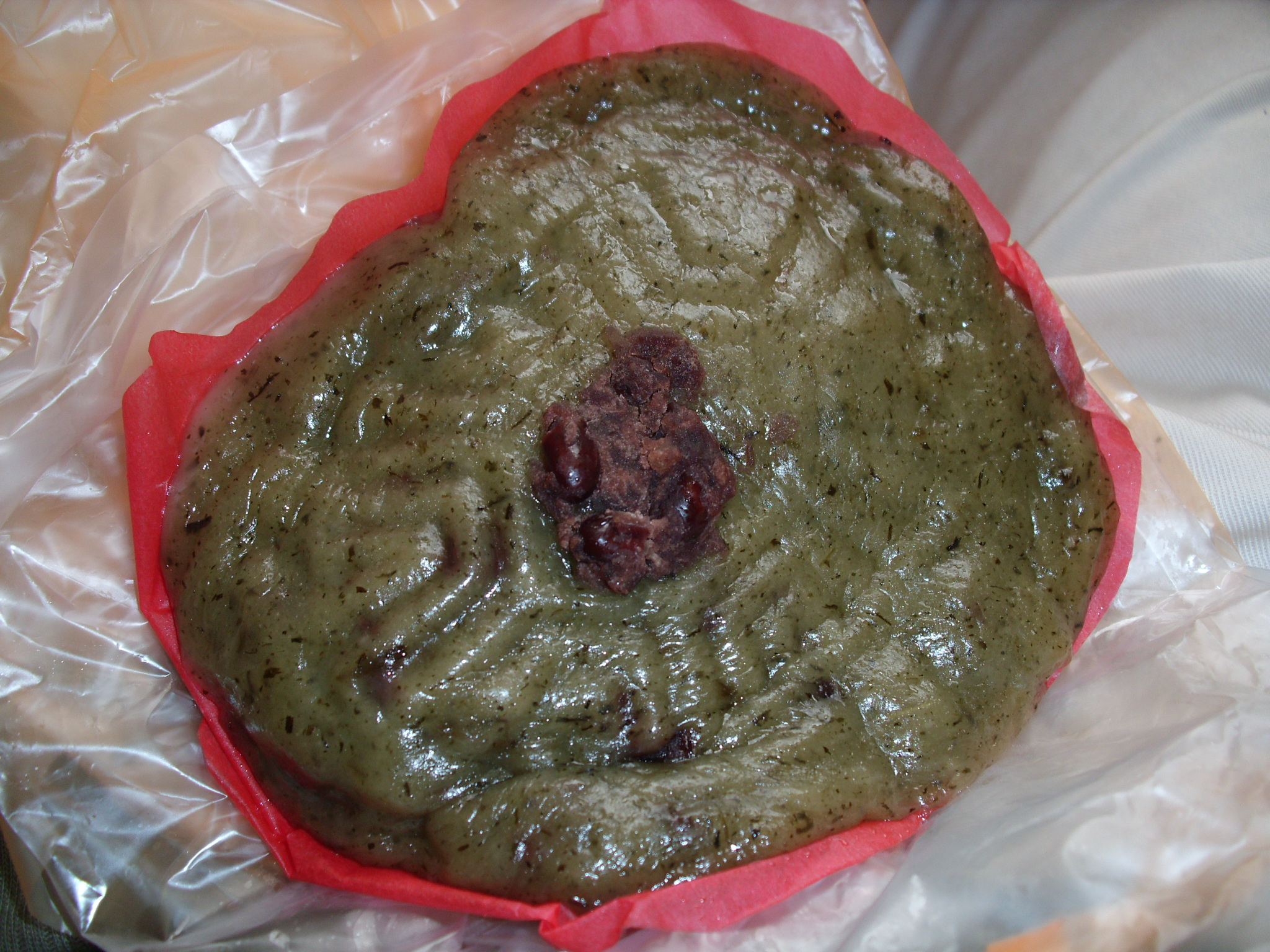 Bân-lâm-gú: 草仔粿、烏草仔龜，佇木柵路二段雪山茶行的店面買的，茶行敢若無咧賣茶米，一樓咧賣「古早味草仔粿」，我買一塊包菜晡米的，一塊紅豆的，按呢五十箍，翕這塊是紅豆，面頂有紅豆的記號，閣有印龜殻，這馬是較罕得看草仔粿閣有印龜殻。